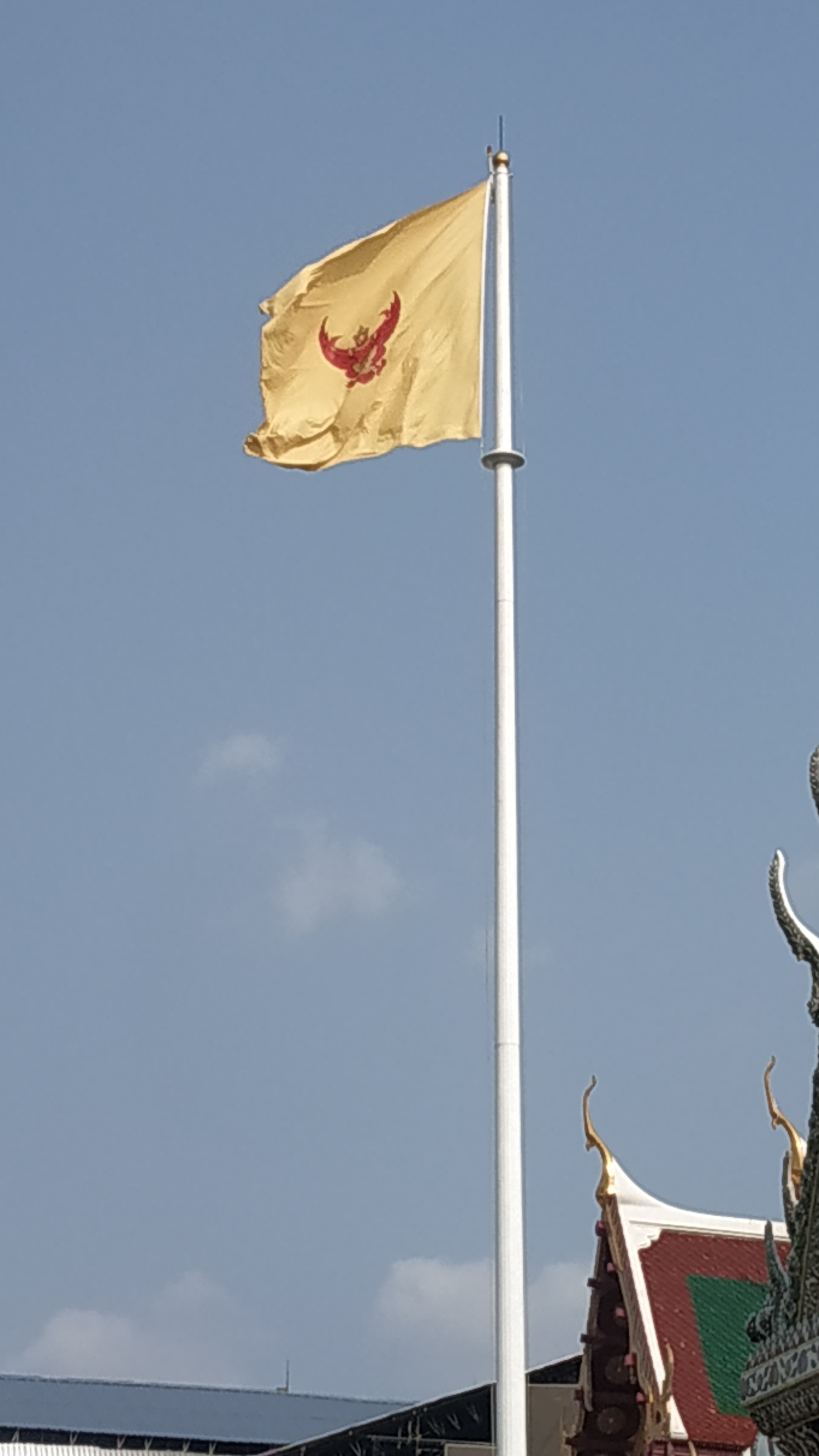 เสาธงมหาราชที่สนามข้างพระที่นั่งบรมพิมาน ภายในพระบรมมหาราชวัง กรุงเทพมหานคร ประเทศไทย บันทึกภาพจากลานด้านหน้าพระที่นั่งอมรินทรวินิจฉัยมไหยสูรยพิมาน เมื่อ 29 กุมภาพันธ์ พ.ศ. 2563